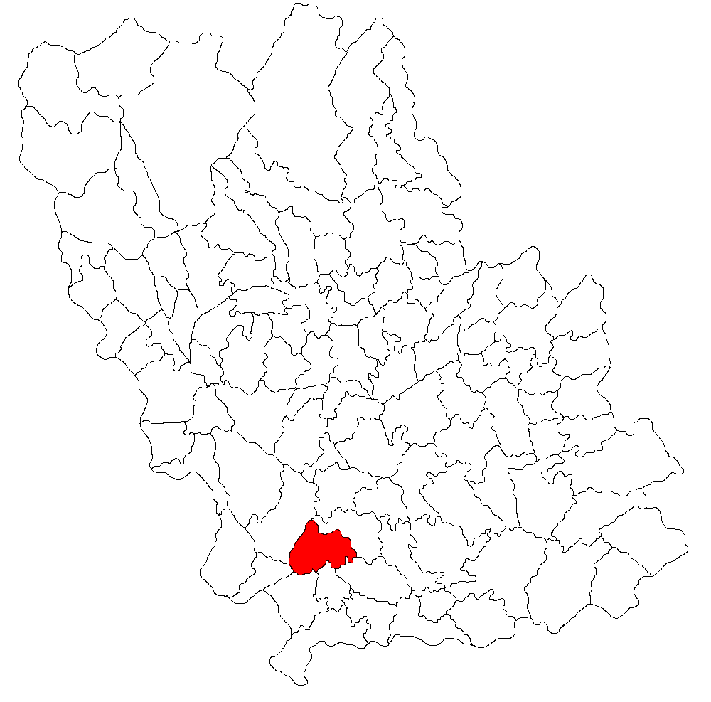 Categorie:Hărţi ale judeţului Prahova